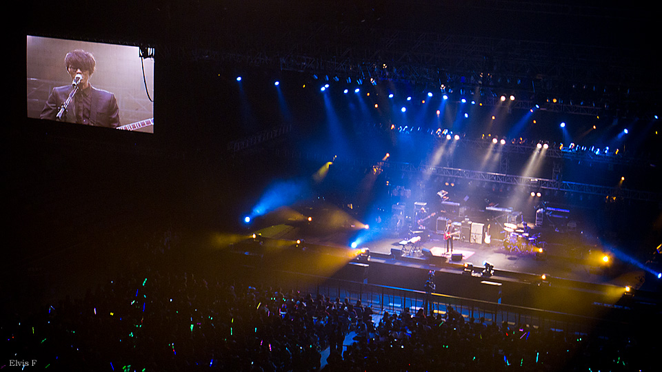 15方大同2011上海演唱會